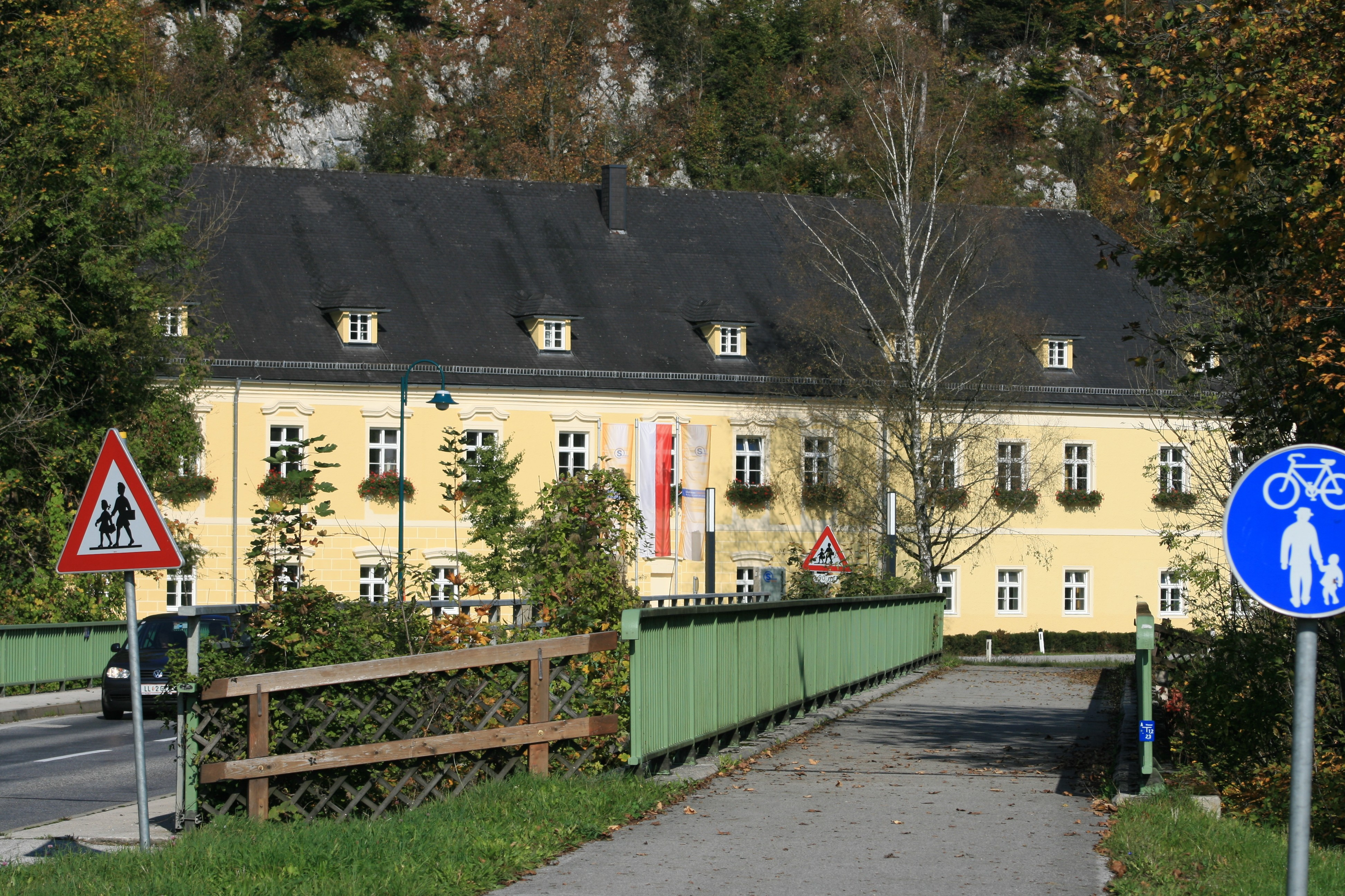 Das Schloss Leonstein (Gemeinde Grünburg, Oberösterreich). Rechts im Vordergrund verläuft der Steyrtalradweg, links die Steyrtal-Landesstraße